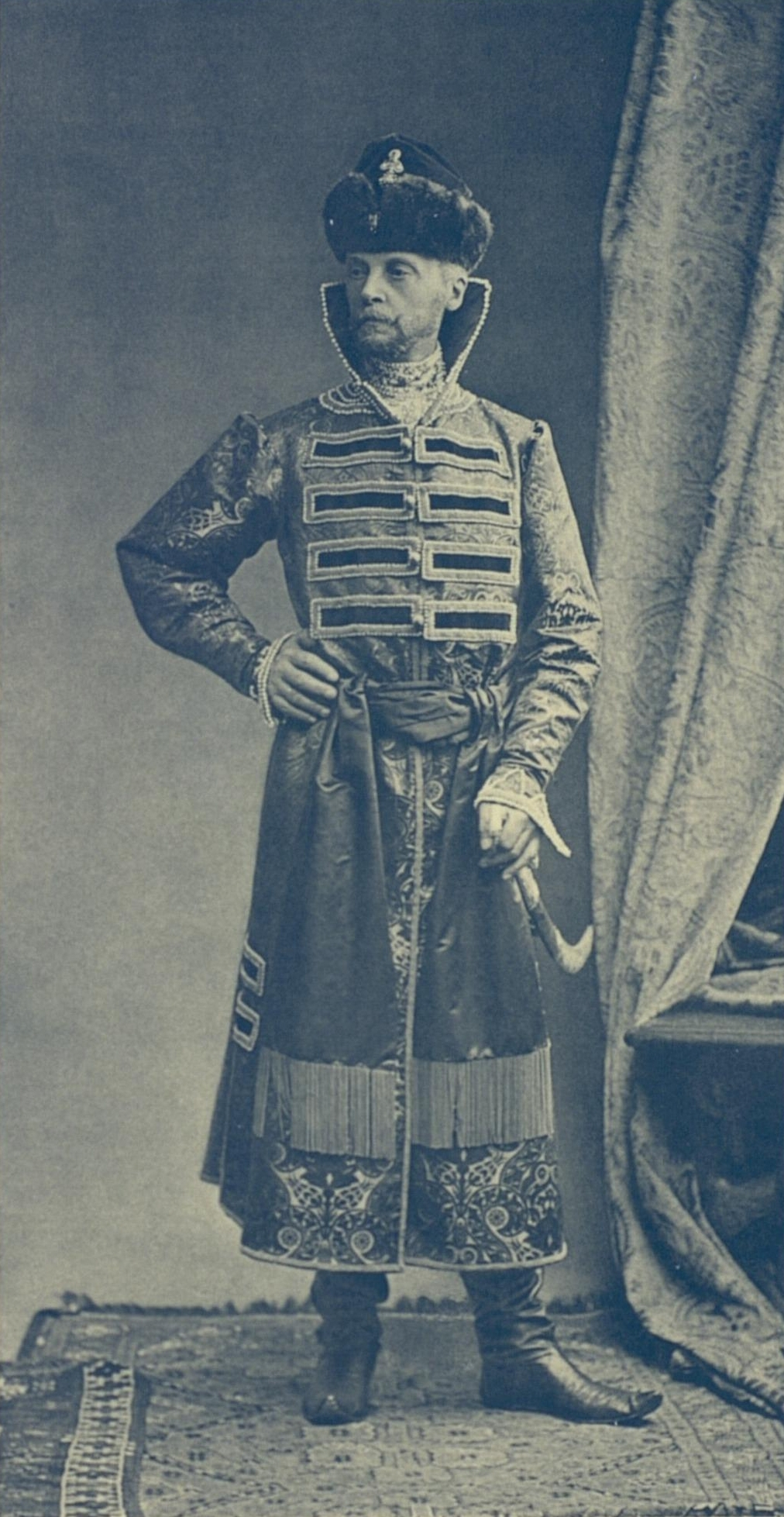 Гофмейстер Двора Е.И.В. Великого Князя Михаила Николаевича, генерал-лейтенант Пётр Петрович Баранов в одеждах стольника XVII века.